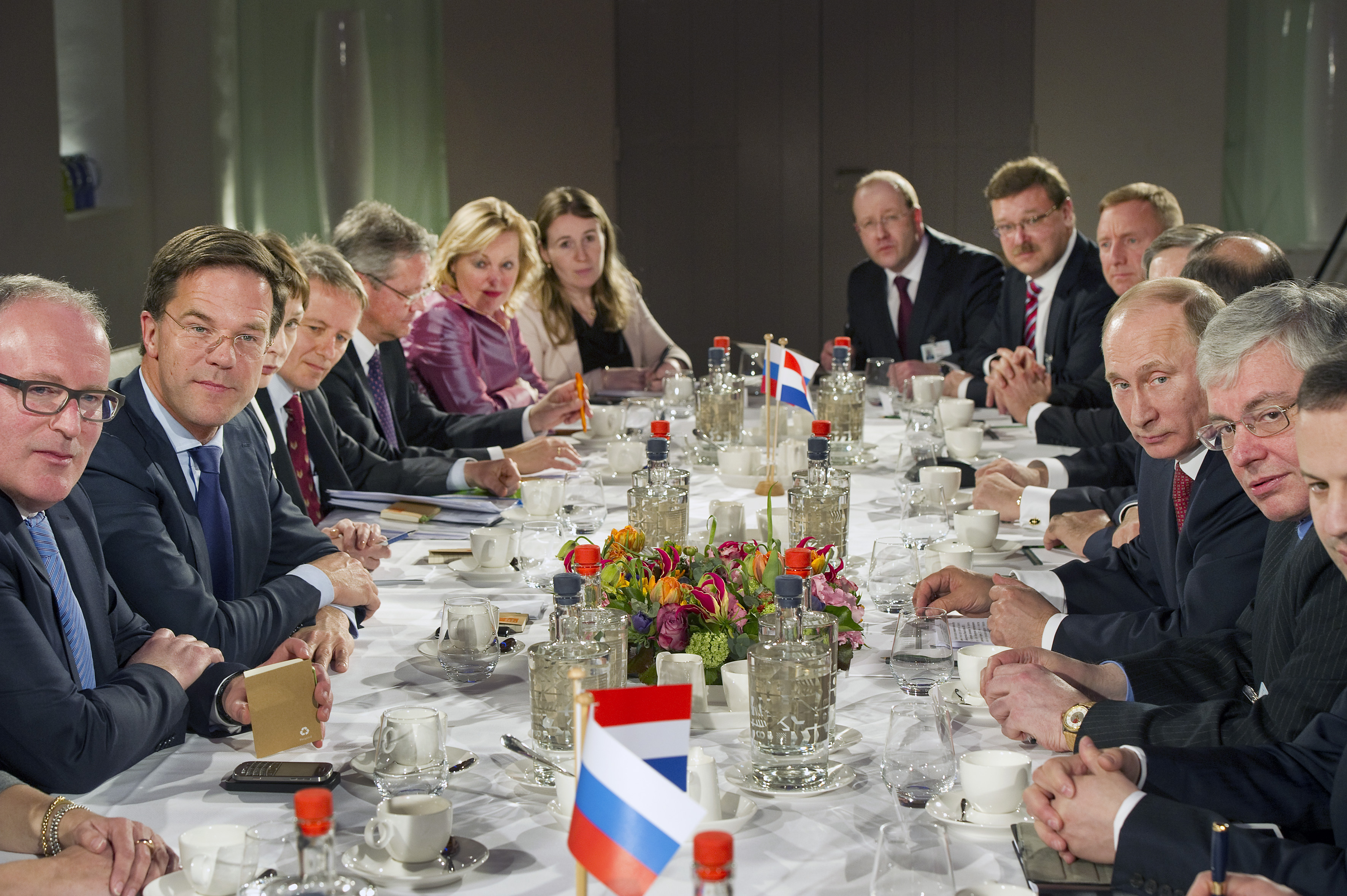 President Poetin bezoekt Nederland ter gelegenheid van het Nederland-Ruslandjaar. Minister-president Rutte spreekt zijn Russische collega in het Scheepvaartmuseum in Amsterdam. Het bezoek wordt afgesloten met een werkdiner met vertegenwoordigers uit het Nederlandse en Russische bedrijfsleven. Minister-president Rutte benadrukt het belang van de economische relatie voor beide landen: ‘Nederland behoort tot de top drie van handelspartners en investeerders in Rusland. Andersom is Nederland binnen de EU de belangrijkste exportbestemming voor Rusland’. Rutte wil de economische relatie verbreden naar andere terreinen, zoals volksgezondheid, infrastructuur, transport en logistiek. Bovendien willen Nederland en Rusland gaan samenwerken op het gebied van innovatie en modernisering. In dat verband is er ook gesproken over modernisering van de Russische samenleving. ‘Rechtszekerheid is een basis voor investeringen. Buitenlandse en binnenlandse investeringen. Het is tevens een basis voor innovatie en het ontkiemen van creativiteit’, aldus premier Rutte. Hij benadrukt dat het ‘past binnen de brede dialoog die Nederland en Rusland voeren om ook over de mensenrechtensituatie te kunnen spreken. Ook al hanteren we verschillende zienswijzen’. Het Nederland-Ruslandjaar wordt op initiatief van de Russische Federatie gehouden ter verbreding en verdieping van de eeuwenlange samenwerking.